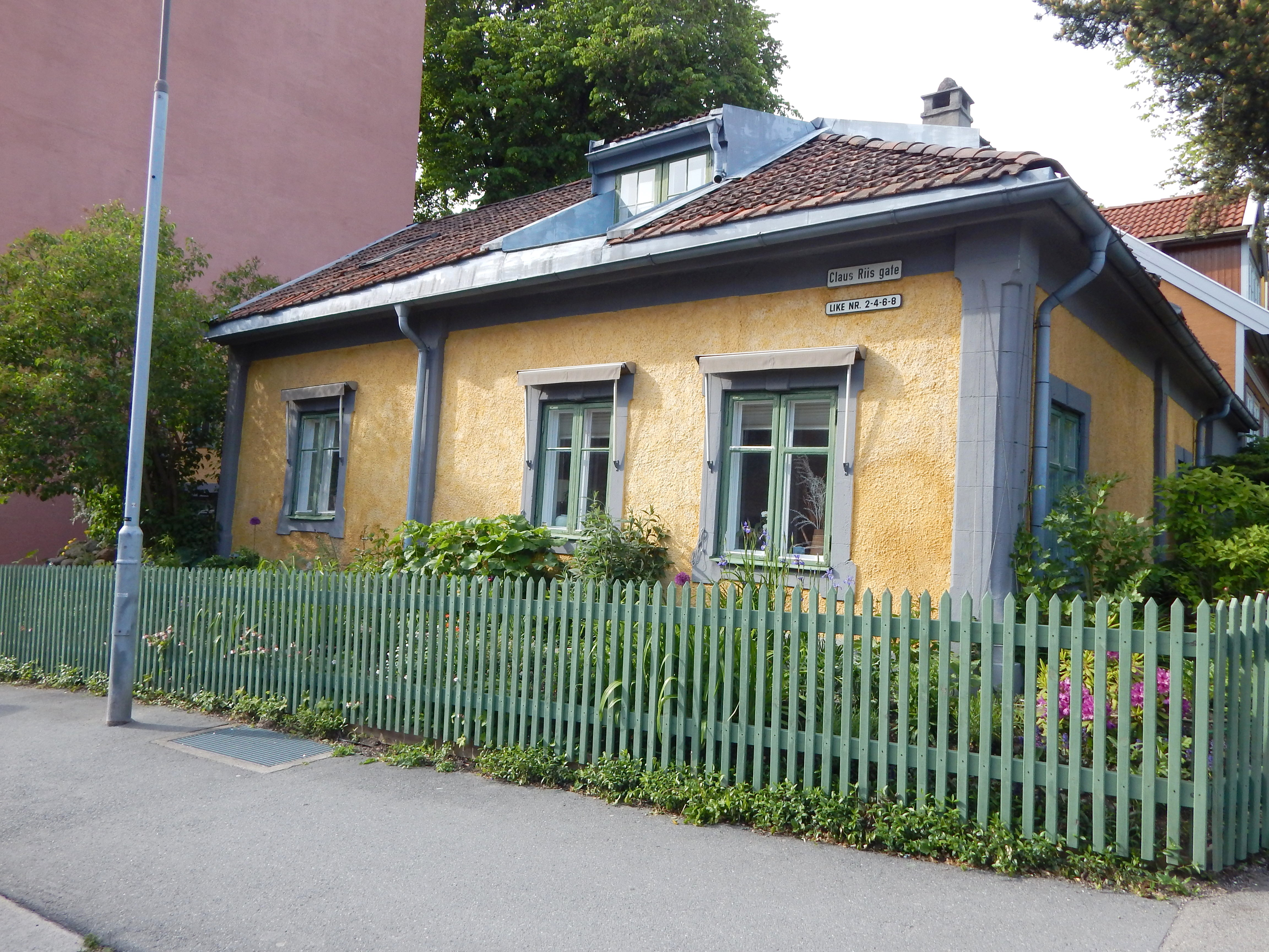 Claus Riis' gate